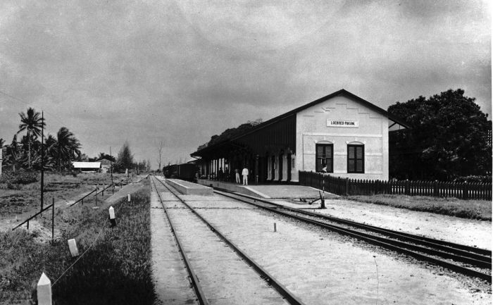 Foto. Het station van Loeboeo-Pakam aan de Deli-spoorlijn, oostkust Sumatra